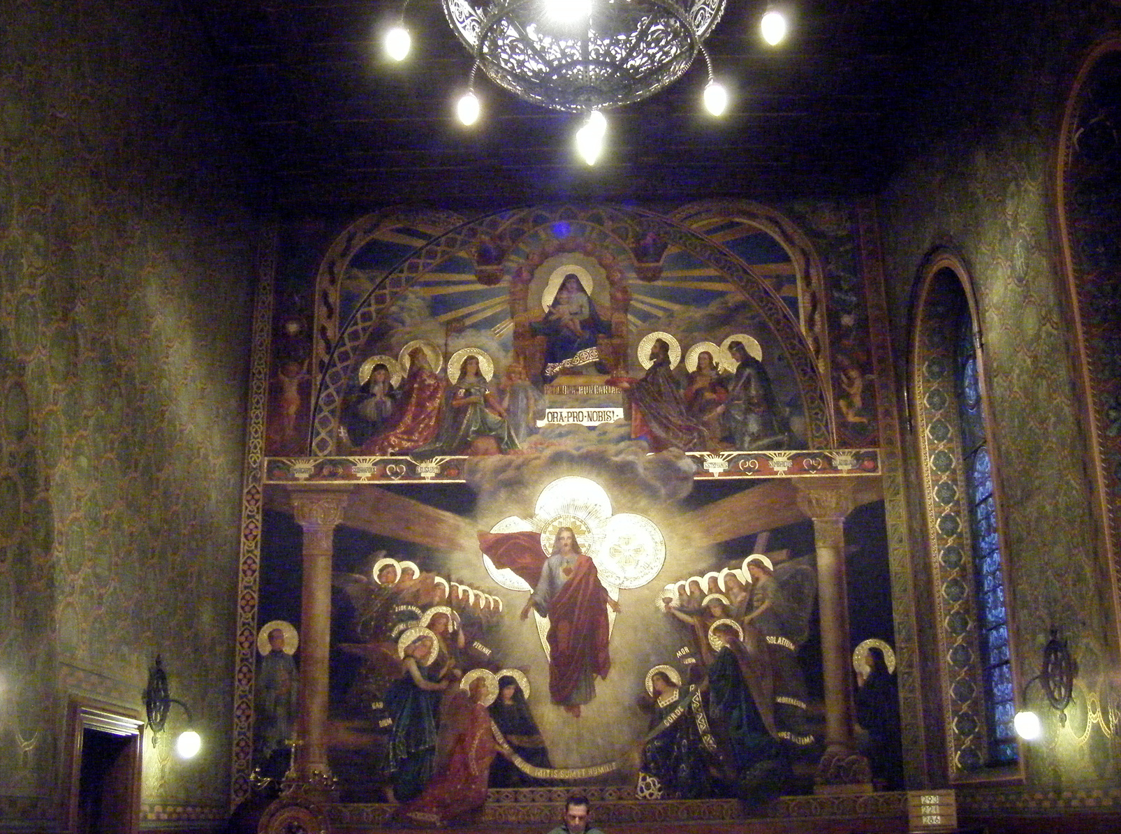 Pázmáneumi kapelle